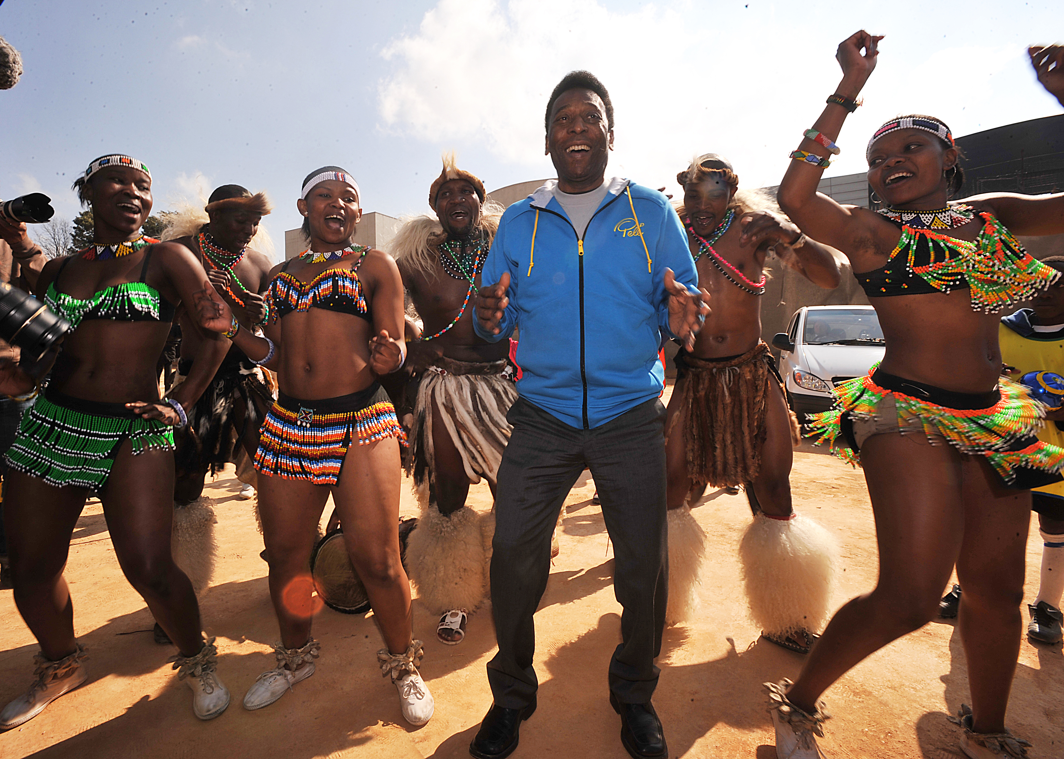 Durante encontro com crianças sul-africanas, Pelé assiste e participa de dança com nativos.